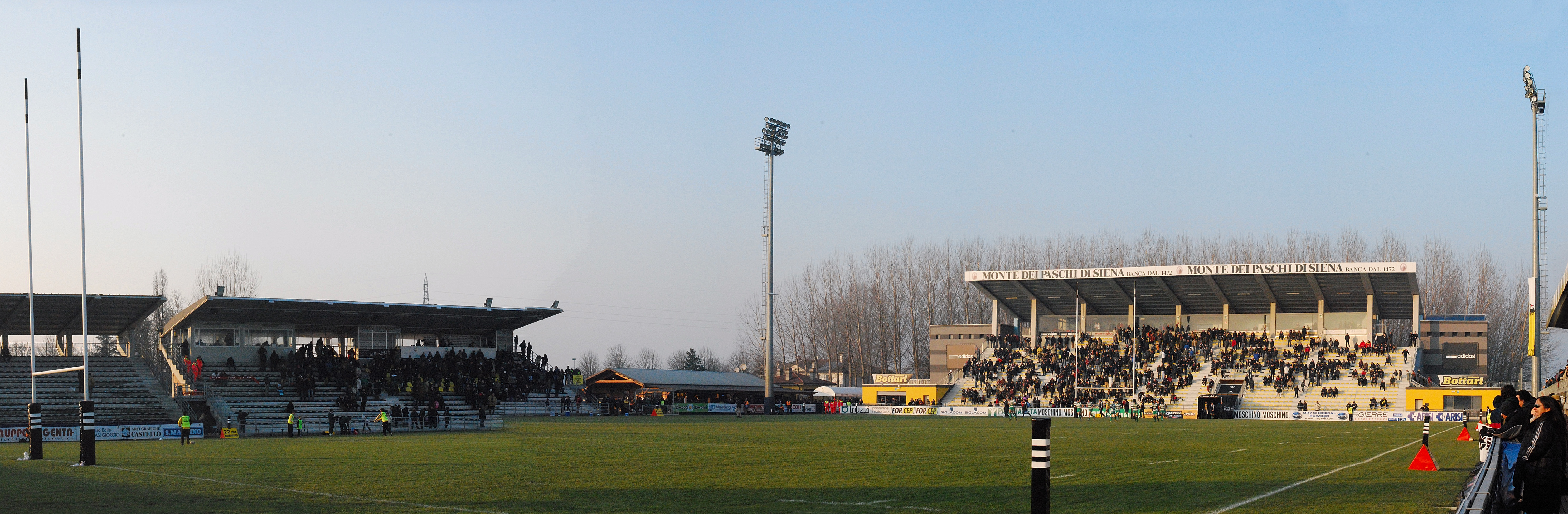 Stadio Zaffanella "Aironi"